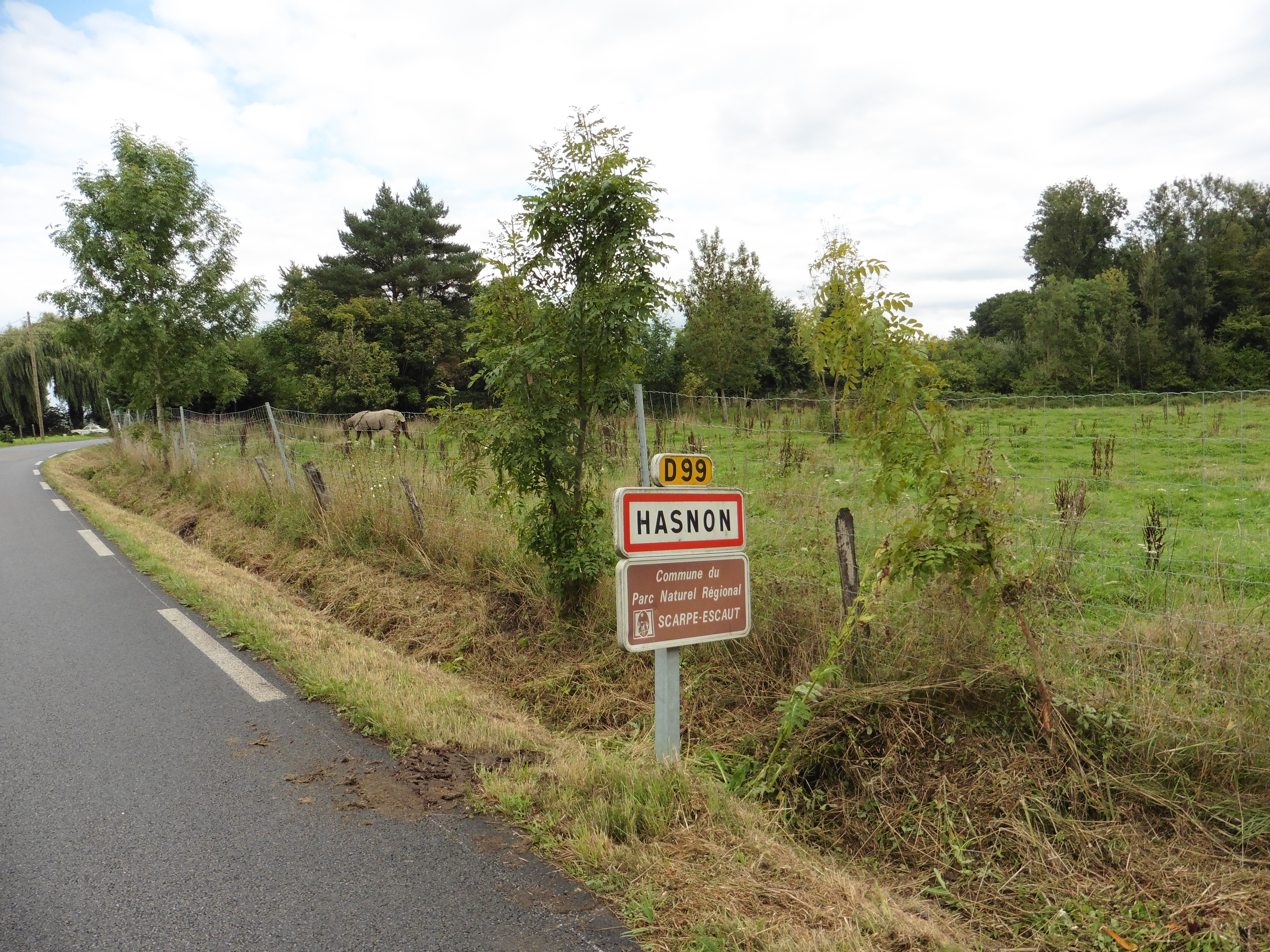 City limit signs Hasnon-la-Cataine sur la D99.- Nord.- france